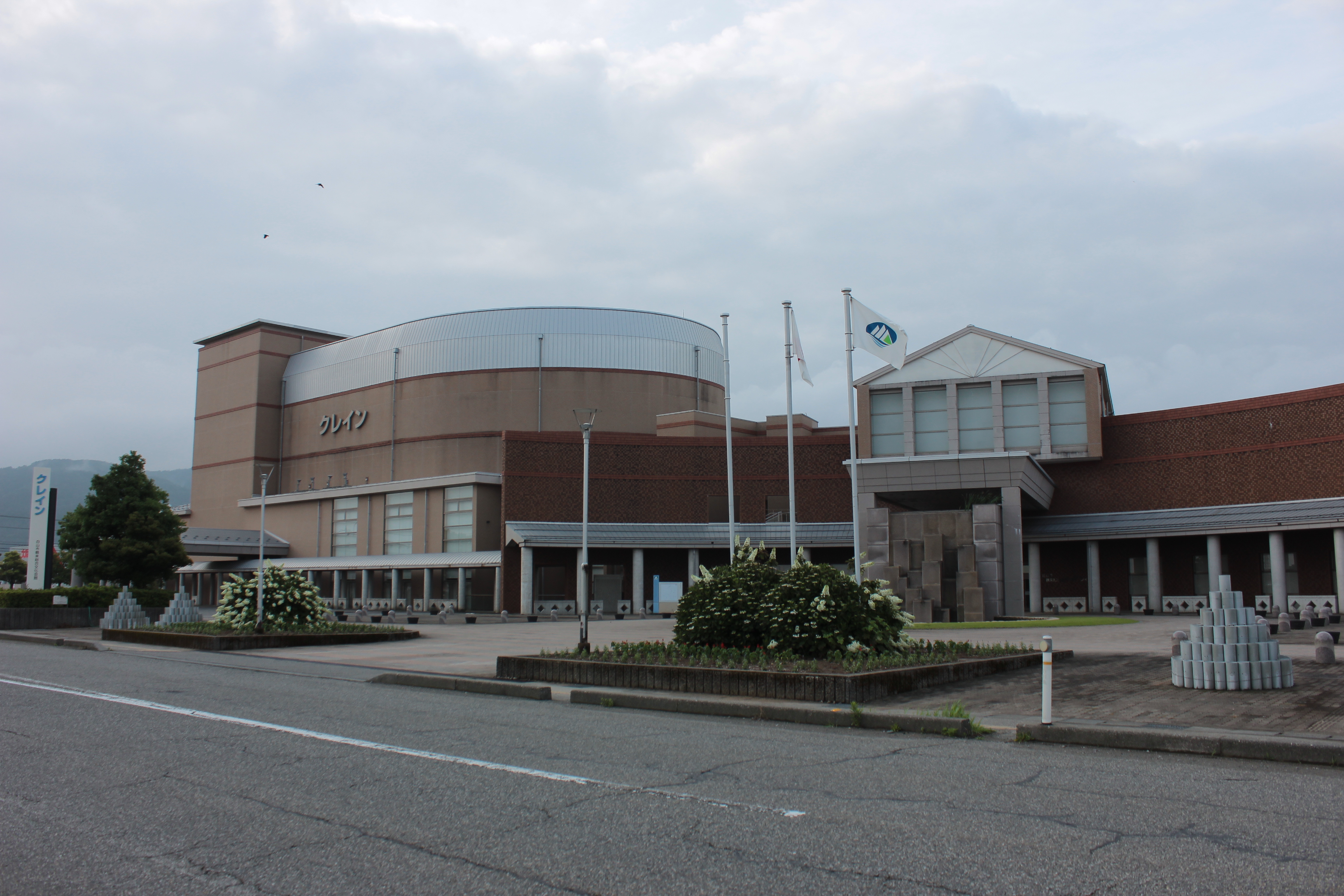 白山市鶴来総合文化会館クレイン（石川県白山市）、白山市立鶴来図書館が併設されている。 Canon EOS Kiss X5